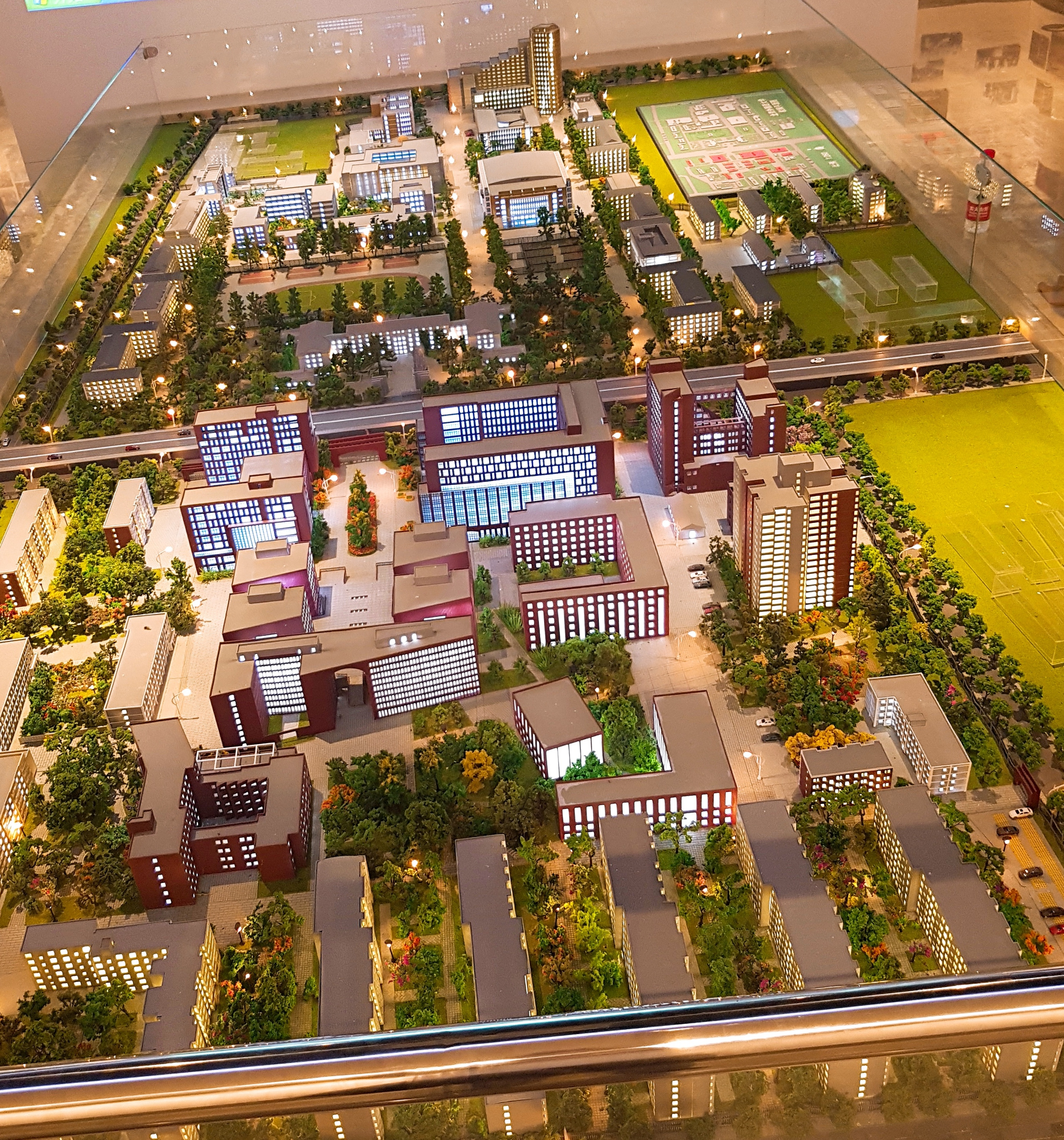 北京外國語大學